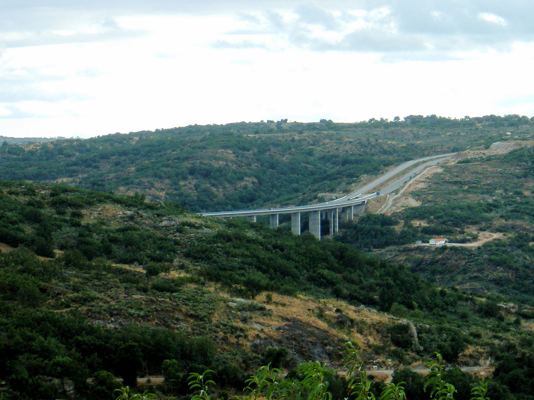 Autoroute A25 au nord du Portugal